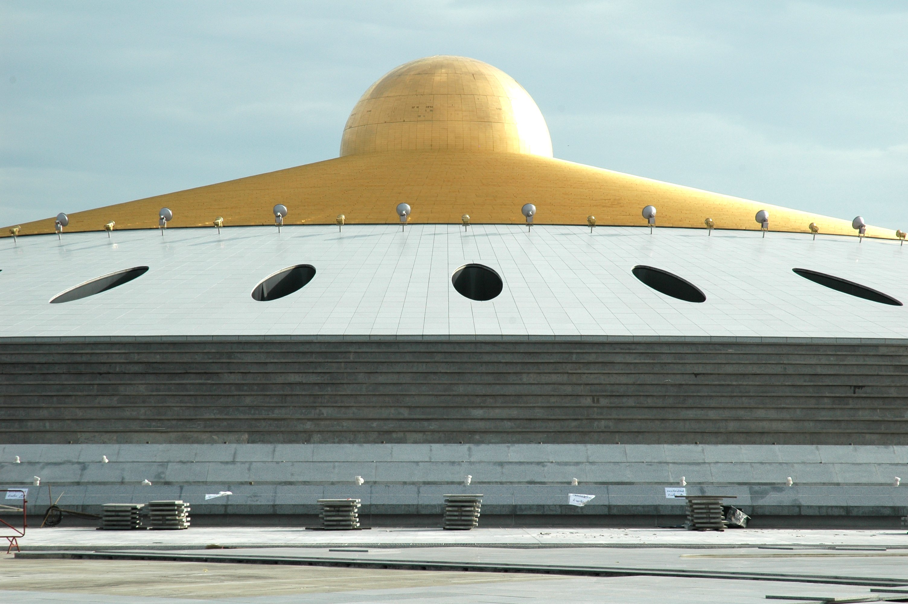 UFO Memorial Hall, Wat Dhammakaya, Rangsit, Pathum Thani, Thailand